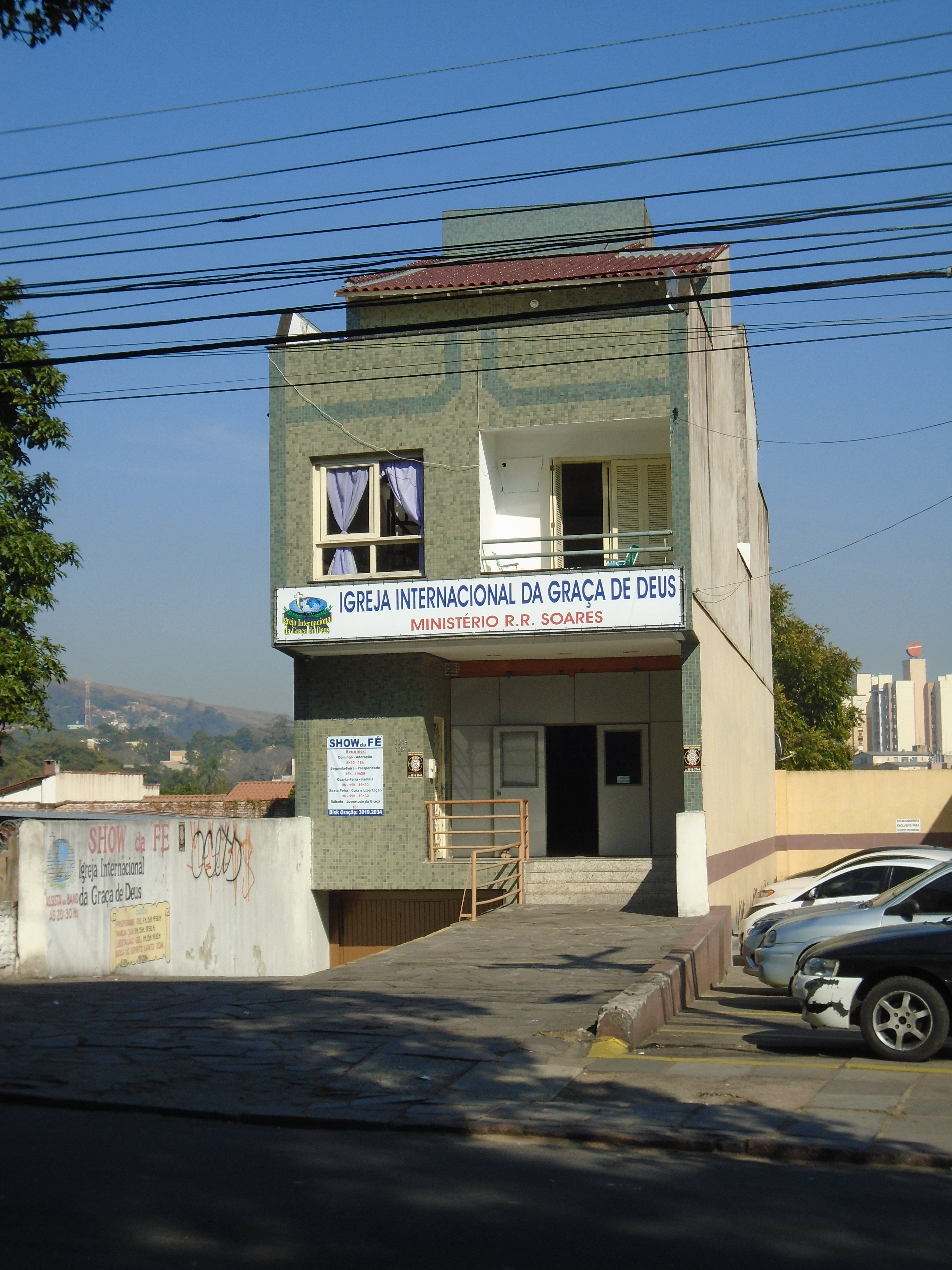 Igreja Internacional da Graça de Deus (Bairro Glória, Porto Alegre, Brasil) 2016-06-15